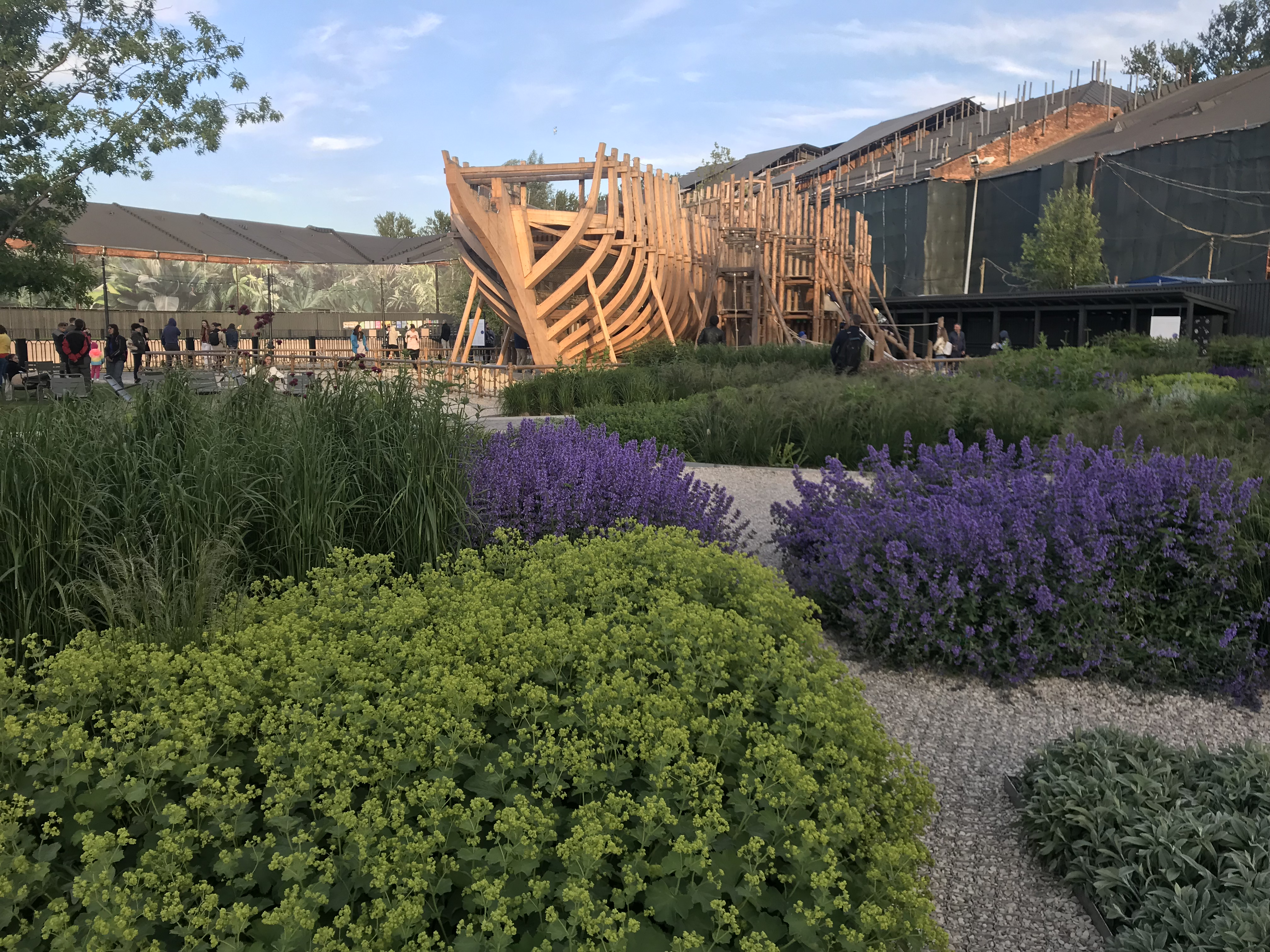 Травяной сад в Новой Голландии, Санкт-Петербург